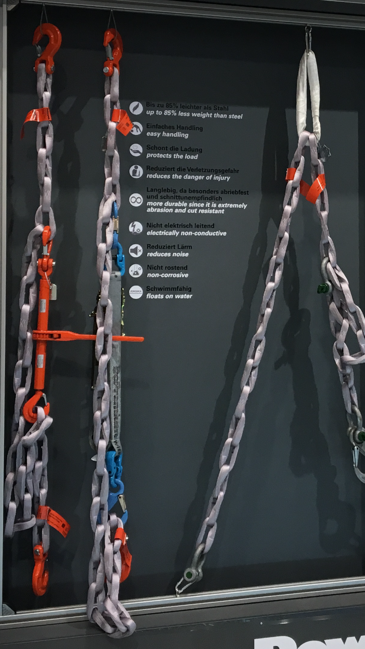 Auf dem Bild sieht man zwei textile Zurrketten und eine textile Anschlagkette auf der A+A Messe in Düsseldorf.